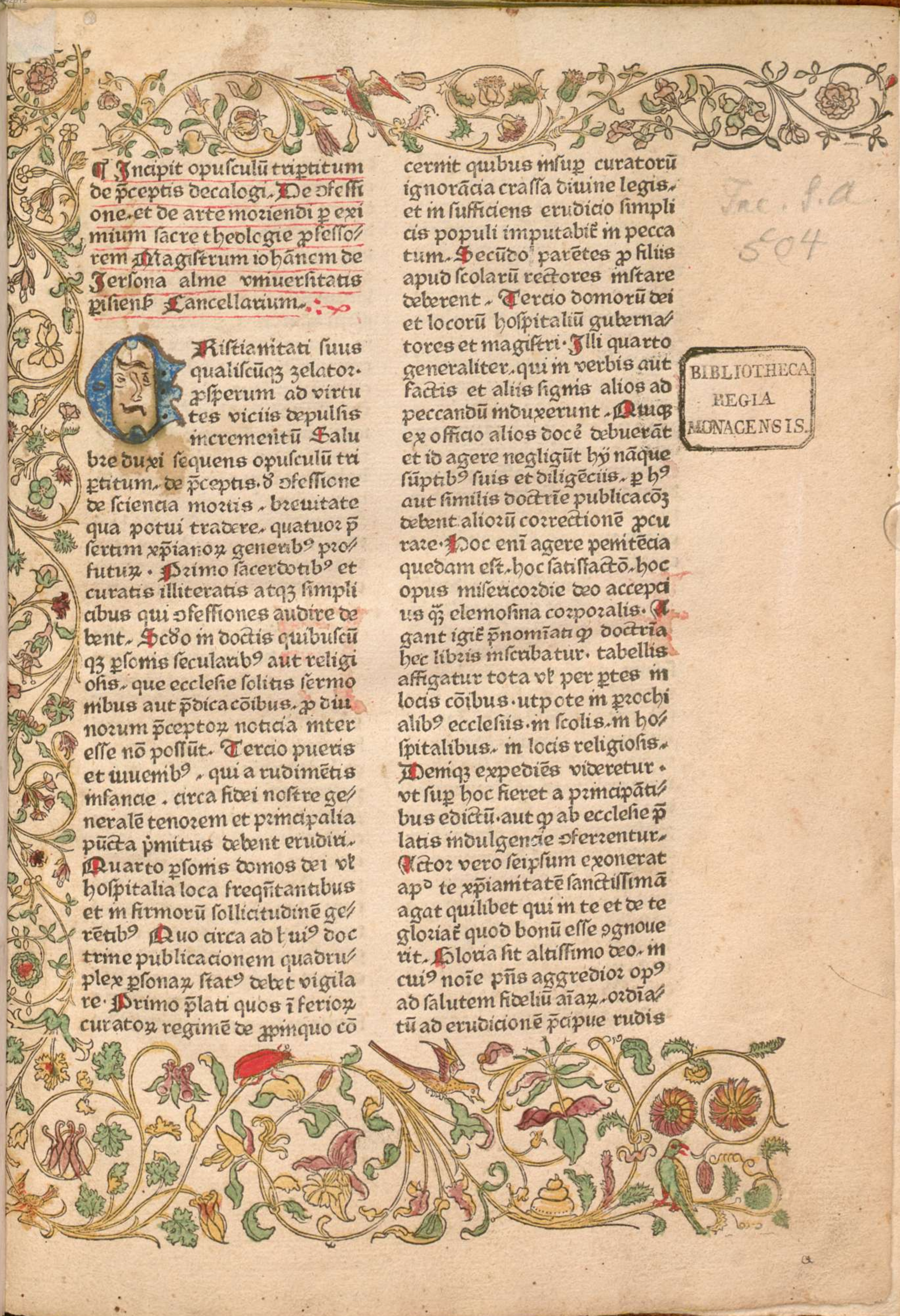 Opusculum tripartitum de praeceptis decalogi, de confessione, de arte moriendi, [Urach], [ca. 1480] [BSB-Ink G-188GW 10779]